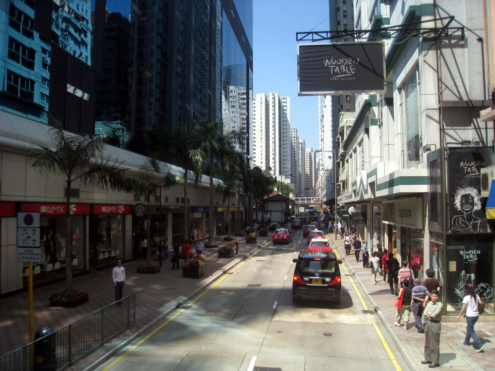 HK Electric Road 電氣道